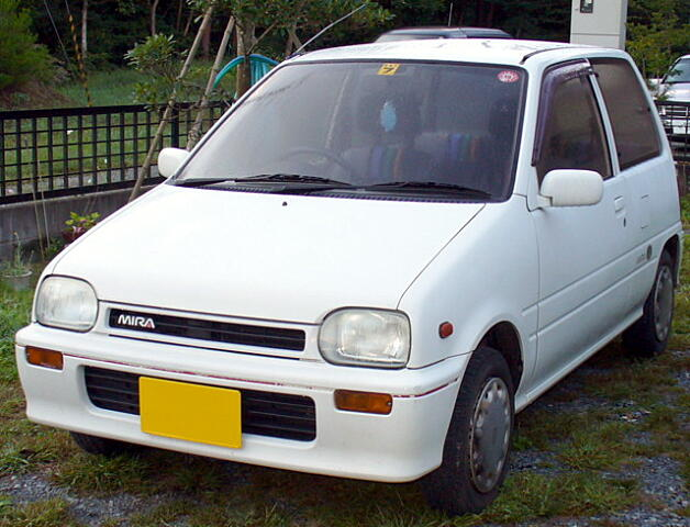 3代目ダイハツ・ミラ